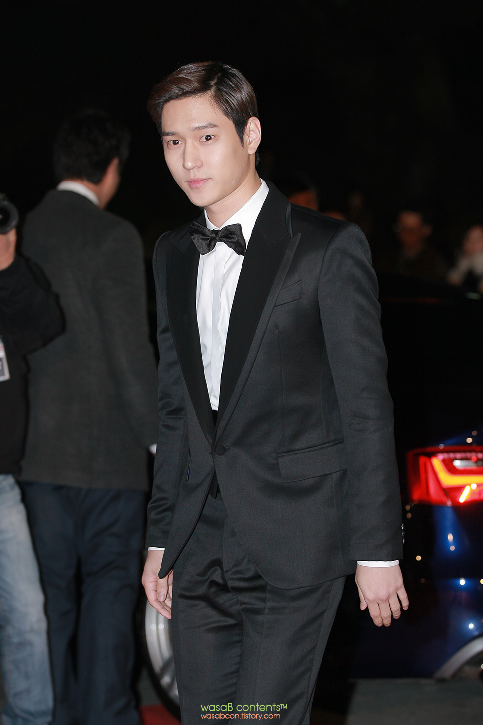 제34회 청룡영화상